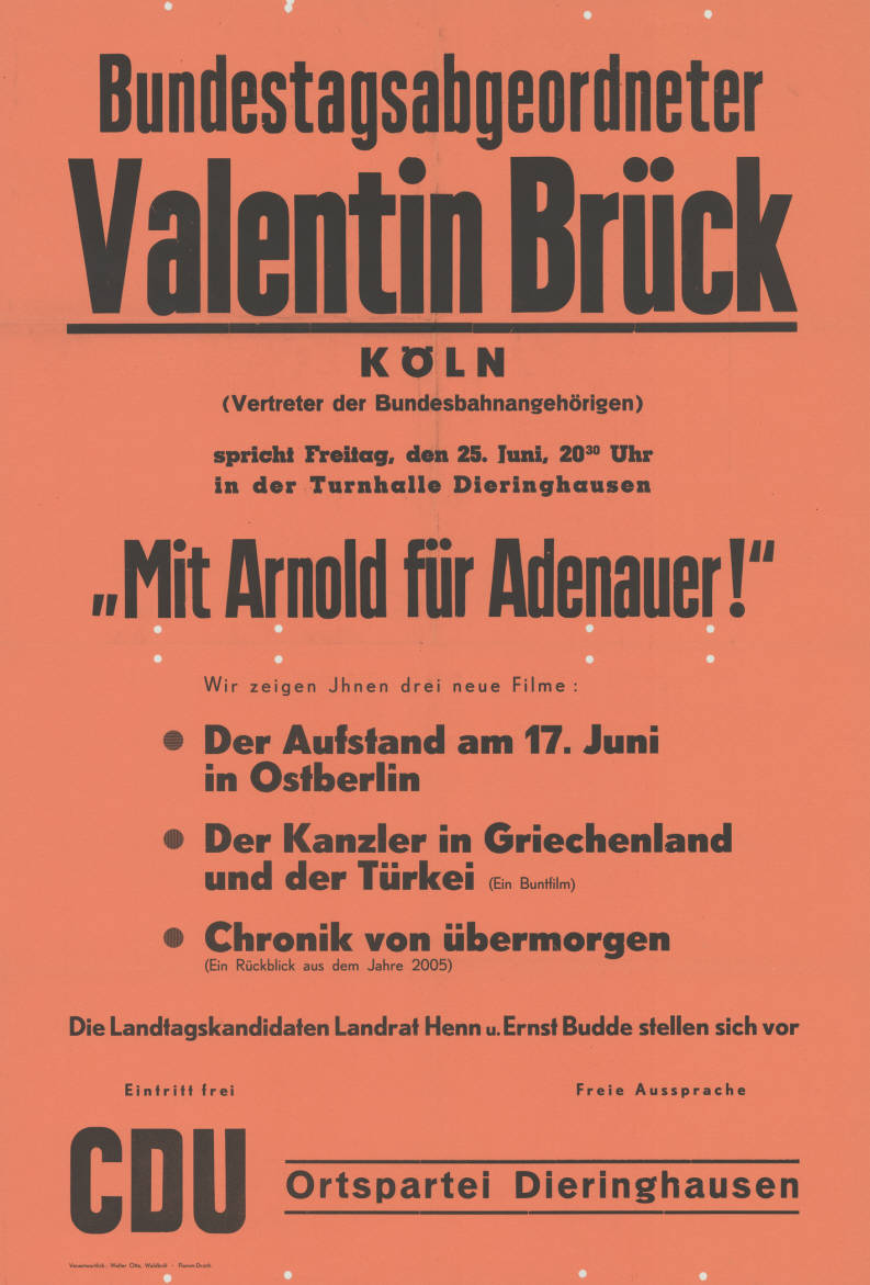 Bundestagsabgeordneter Valentin Brück Köln (Vertreter der Bundesbahnangehörigen) spricht ... "Mit Arnold für Adenauer!" Wir zeigen Ihnen drei neue Filme: . Der Aufstand am 17. Juni in Ostberlin . Der Kanzler in Griechenland und der Türkei (Ein Buntfilm) . Chronik von übermorgenn (Ein Rückblick aus dem Jahr 2005) Die Landtagskandidaten Landrat Henn u. Ernst Budde stellt sich vor! Eintritt frei Freie Aussprache CDU-Ortspartei Dieringhausen Plakatart: Ankündigungsplakat Auftraggeber: Verantw.: Walter Otto, Waldbröl Drucker_Druckart_Druckort: Flamm-Druck Objekt-Signatur: 10-009 : 293 Bestand: Landtagswahlplakate Nordrhein-Westfalen (10-009) GliederungBestand10-18: Landtagswahlplakate Nordrhein-Westfalen (10-009) » Landtagswahl am 27.6.1954 » Ankündigungs- und Motiv-/Textplakate Lizenz: KAS/ACDP 10-009 : 293 CC-BY-SA 3.0 DE